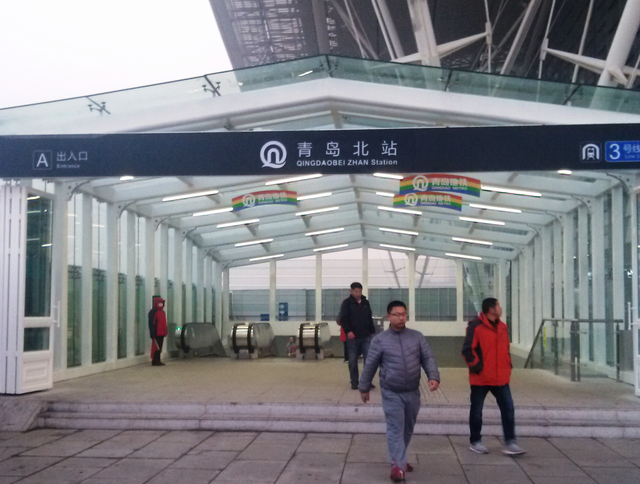 青岛地铁一号线青岛北站A口